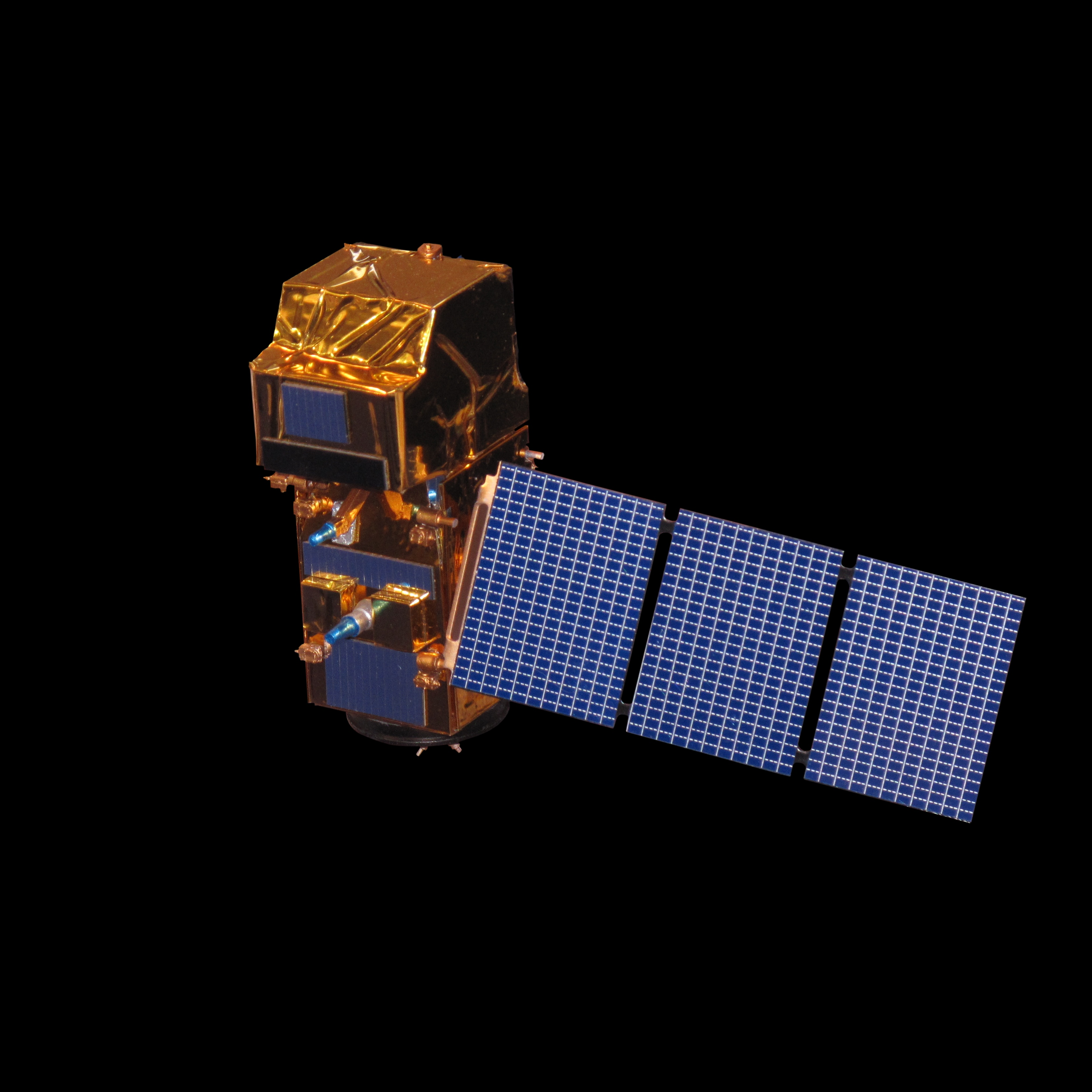 Model of Sentinel 2